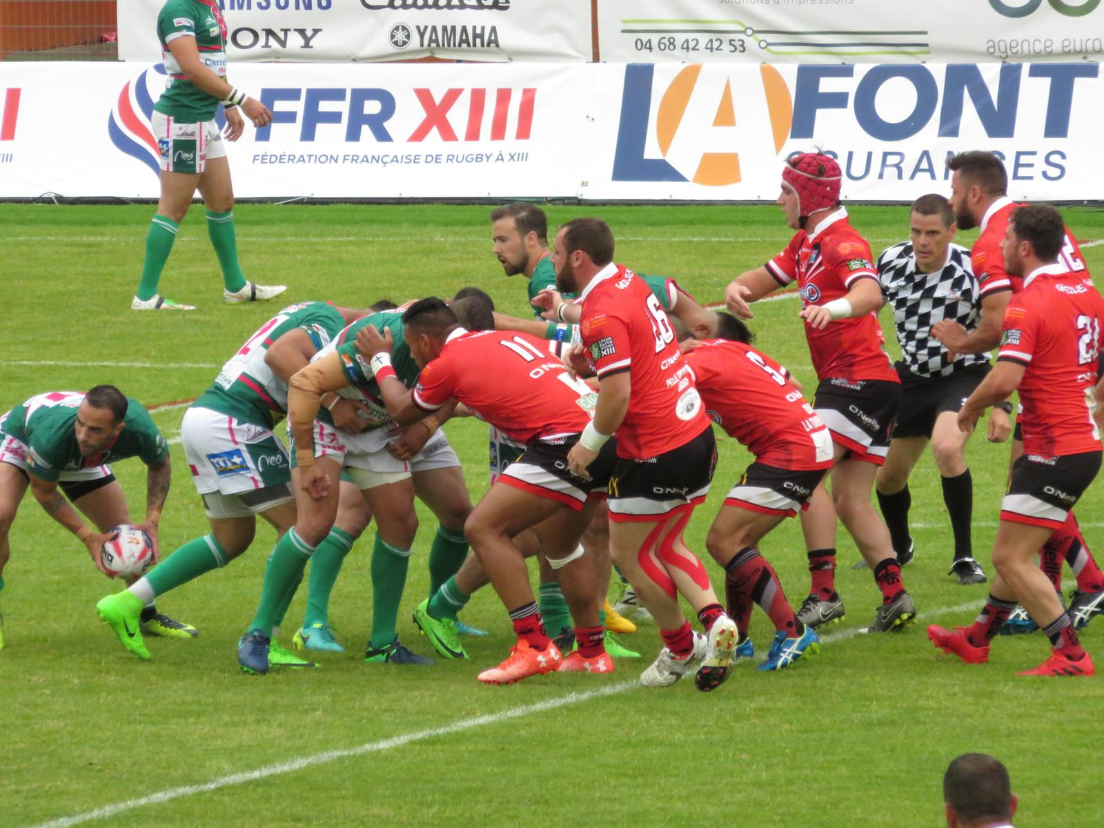 Mêlée lors de la finale du Championnat de France de rugby à XIII 2017 à Narbonne entre Limoux et Lézignan.